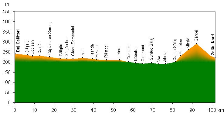 elevation profile of the railway track Dej-Zalau